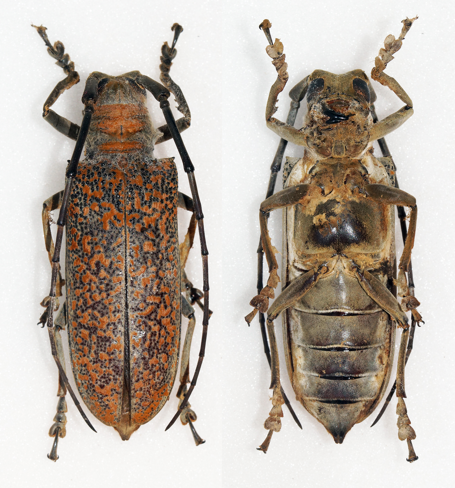 Kriesche,1919 Sex: Female Data: 04-2013 - Tapah Hills - Malaysia Size: 48mm